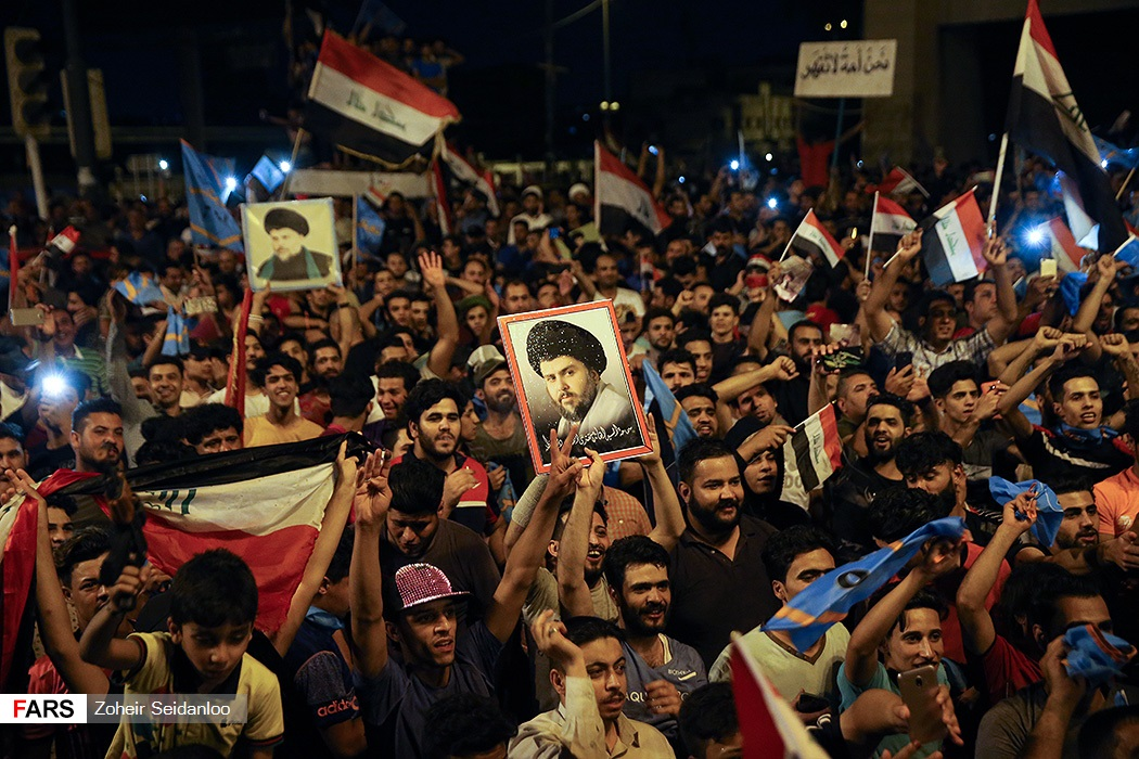 با پایان یافتن چهارمین دوره انتخابات پارلمانی جمهوری عراق، کار شمارش آرا آغاز و مردم هوادار ائتلافها و جریانات مختلف سیاسی عراق نتیجه این رویداد را دنبال میکنند. بامداد دوشنبه ۲۴ اردیبهشت ۱۳۹۷ به وقت تهران، برخی هواداران احزاب و جریانات سیاسی خصوصا حامیان ائتلاف سائرون نیز با حضور در خیابانهای بغداد پایتخت عراق به شادی و پایکوبی پرداختند.